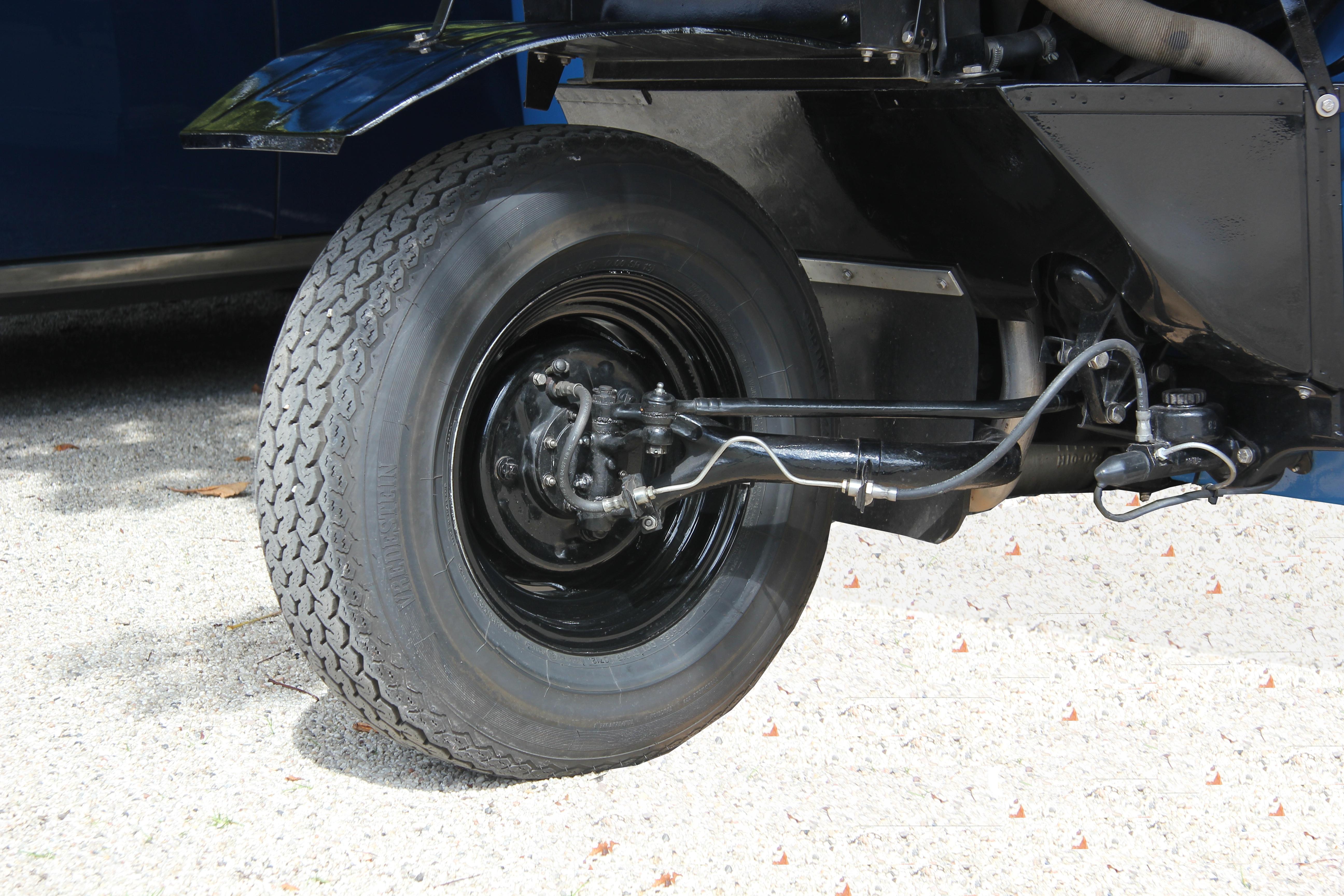 Radaufhängung und Lenkung des Goliath-Dreirads; 9904 von 1955 bis 1961 gebaut